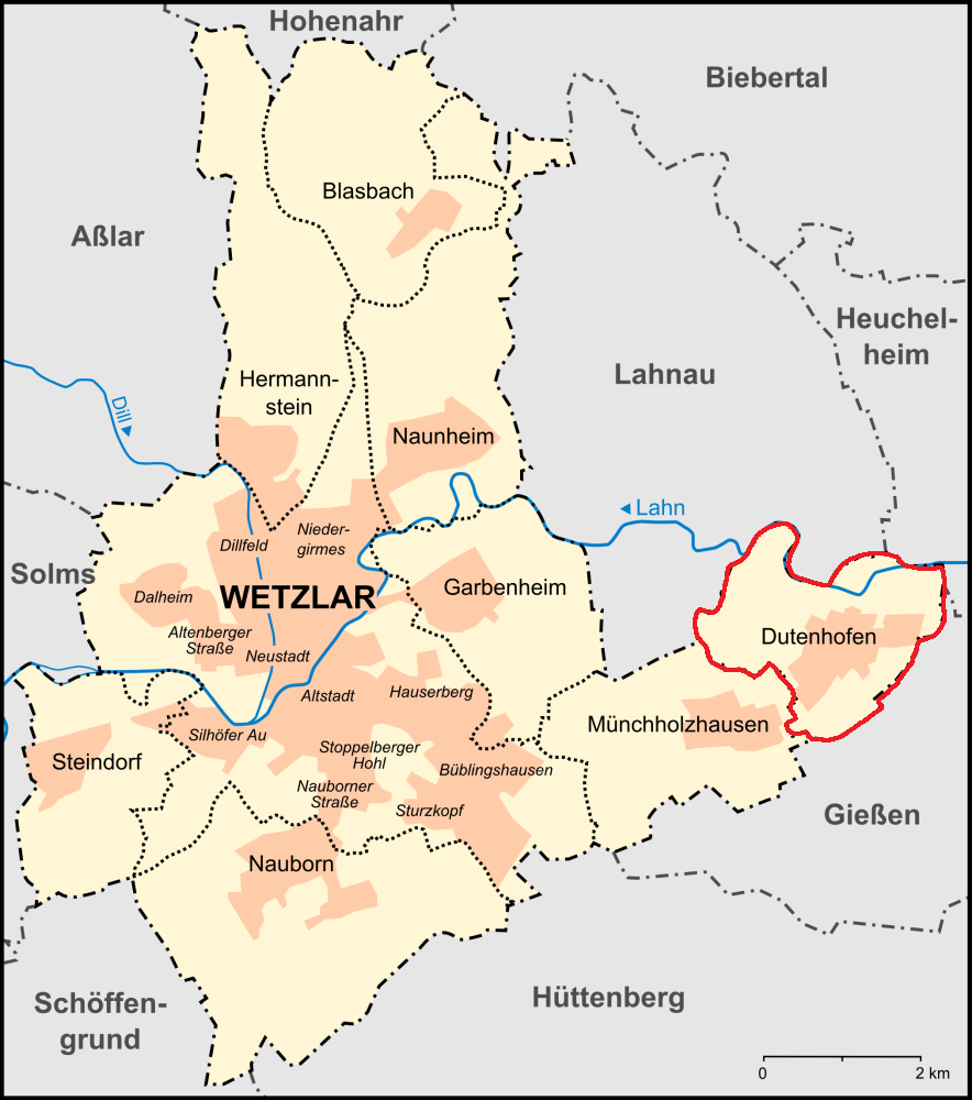 Karte der Stadtteile, Stadtbezirke und Umlandgemeinden - hervorgehoben ist der Stadtteil Dutenhofen Wetzlars